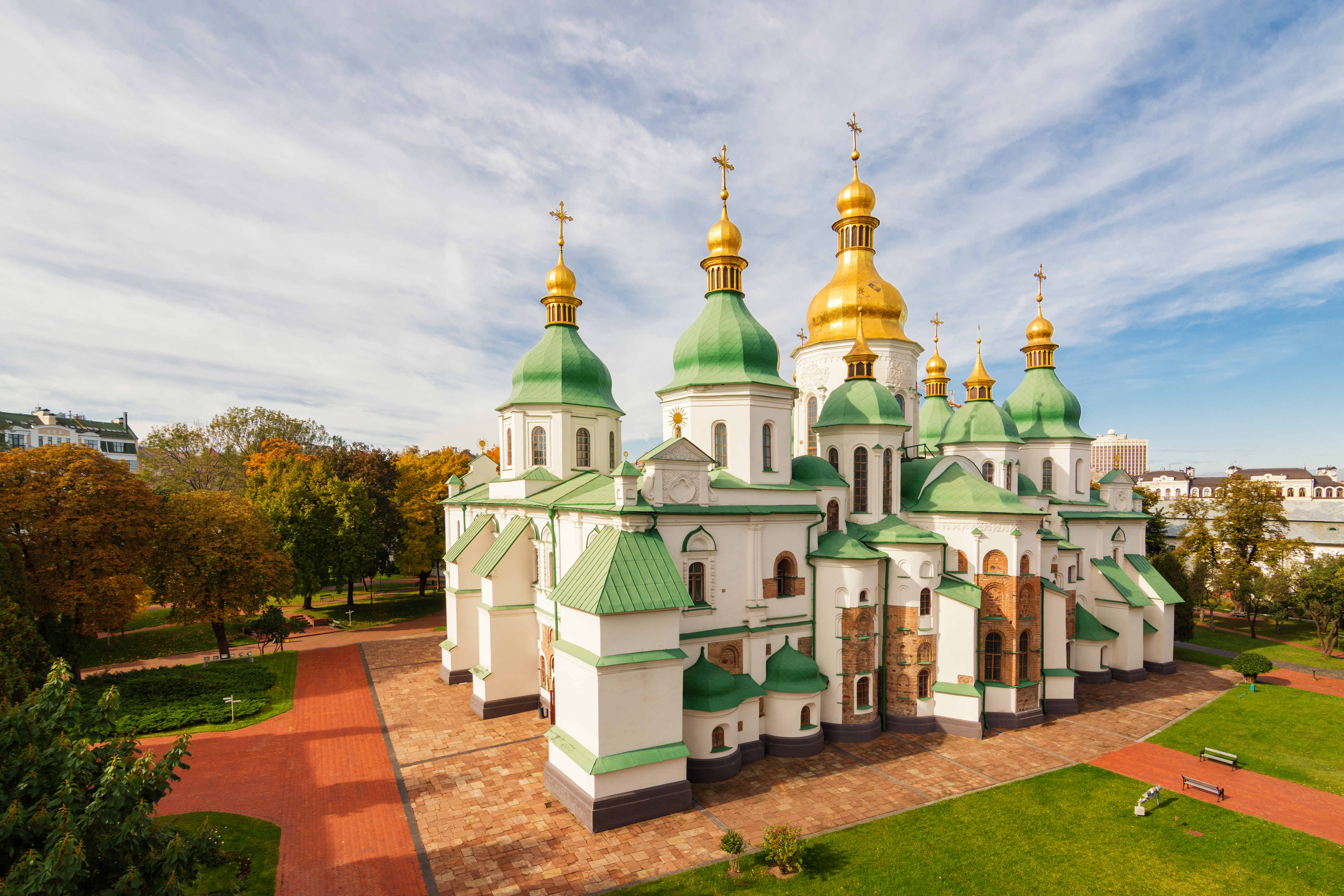 Софійський собор, Київ, вул. Володимирська, 24